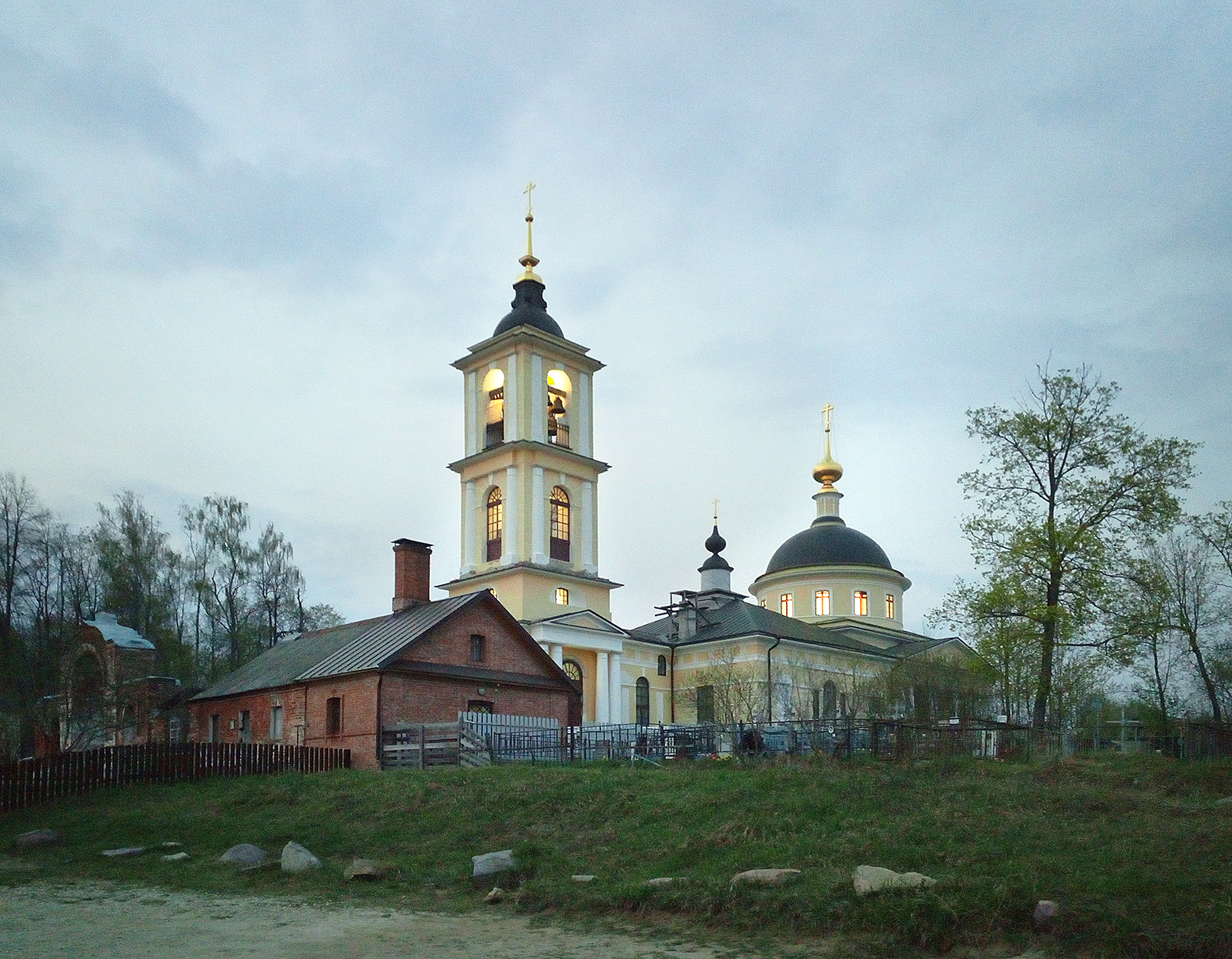 Церковь Воскресения Христова в селе Воскресенье. Петушинский район. Владимирская область. Россия.